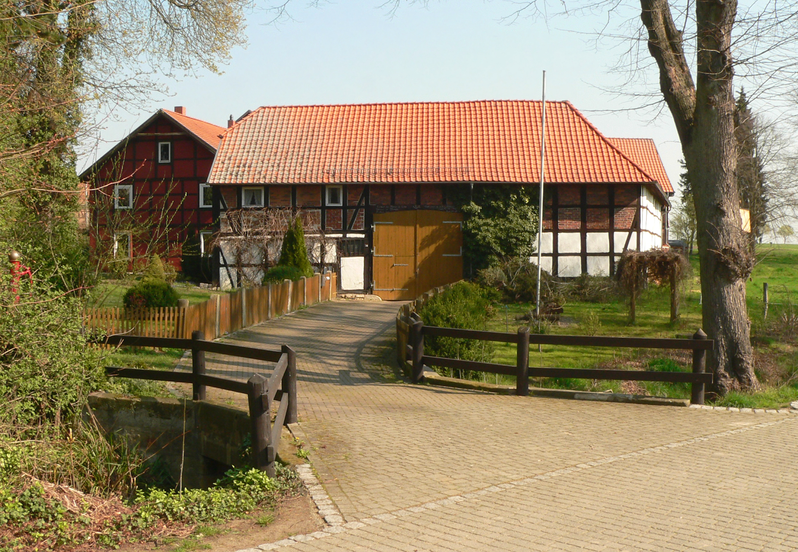 Vierseithof der Wassermühle Liesebach